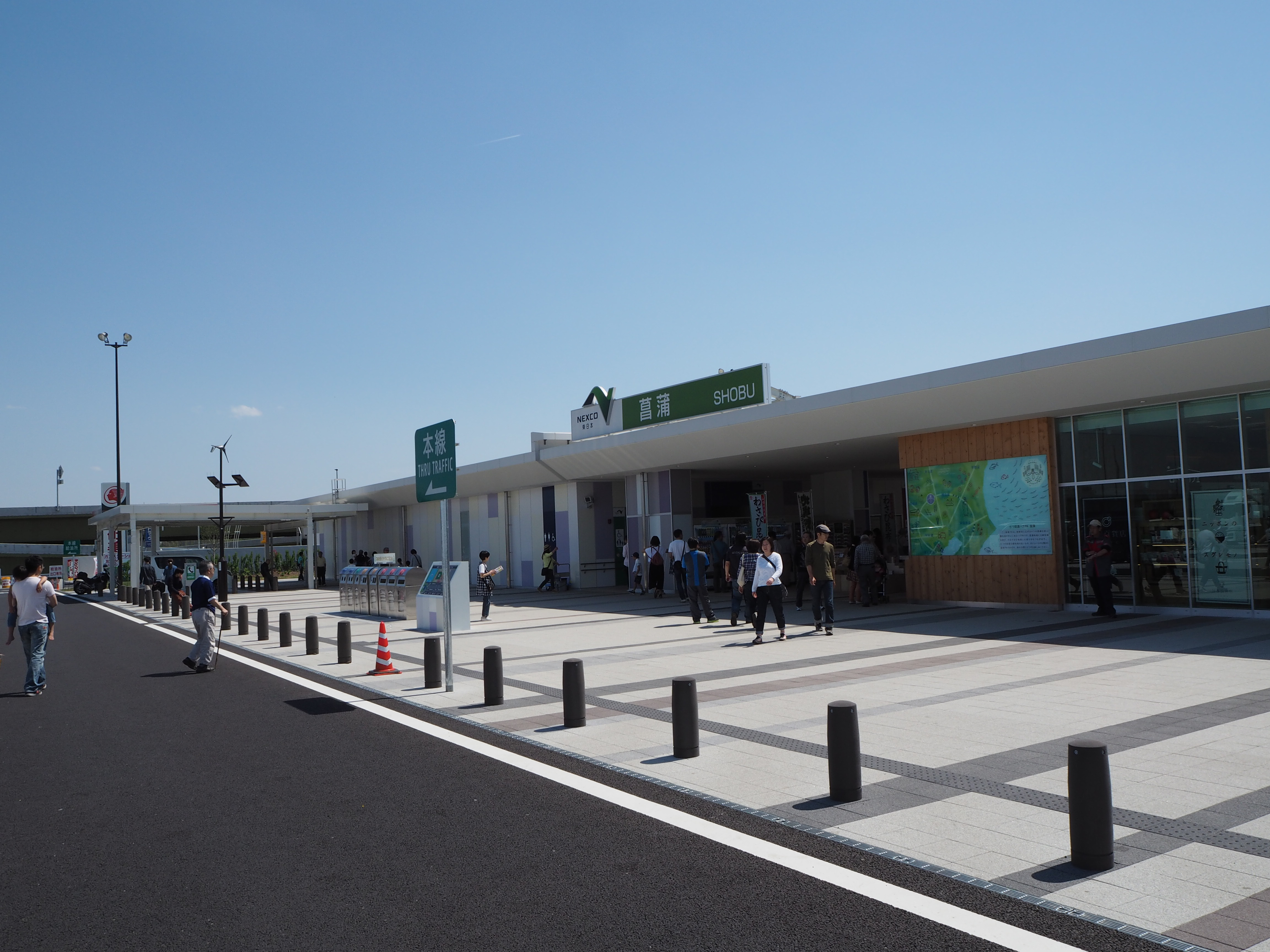 菖蒲パーキングエリア（内回り側から）